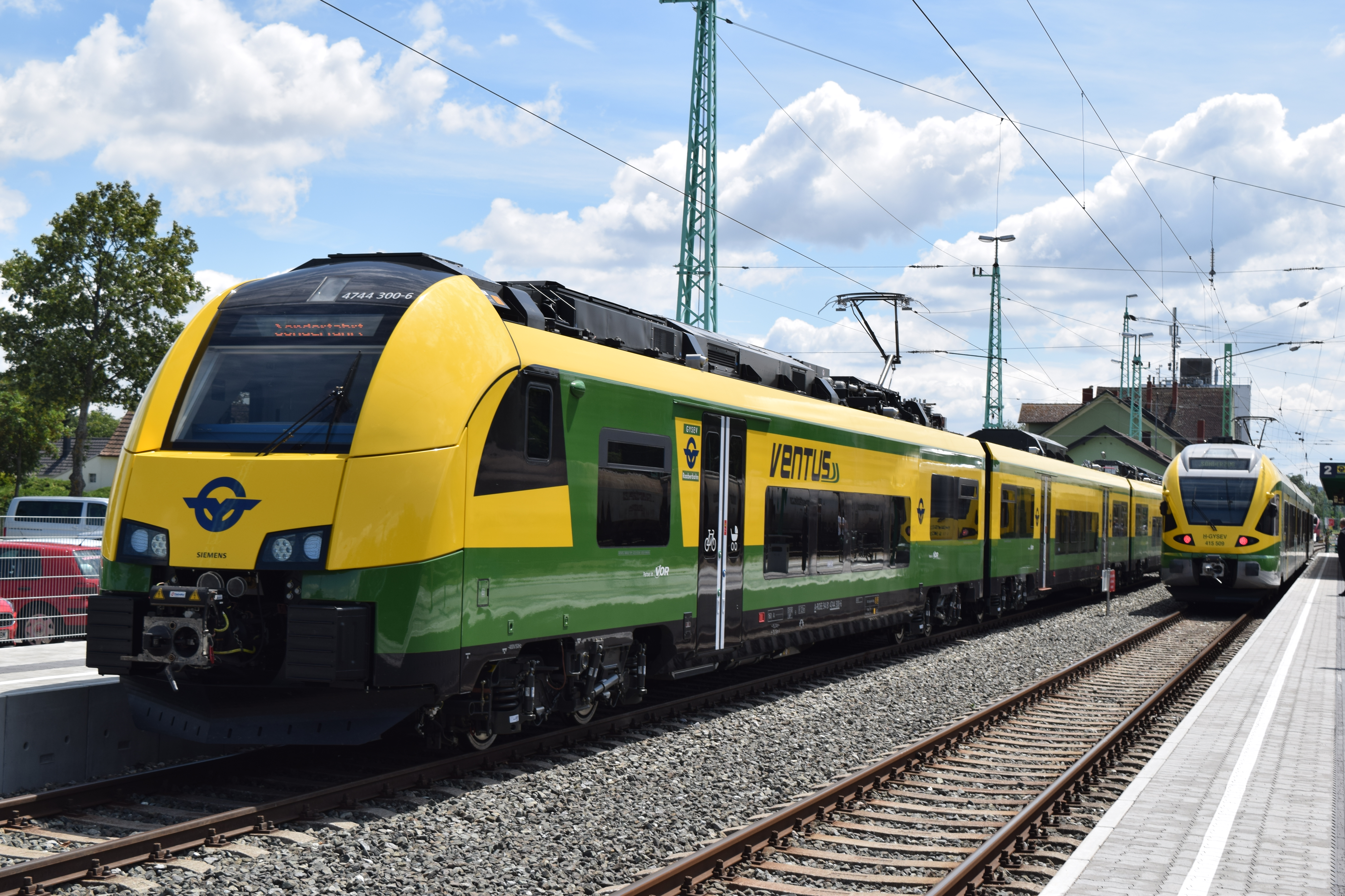 Der erste Gysev Ventus bei der Vorstellung in Wulkaprodersdorf.